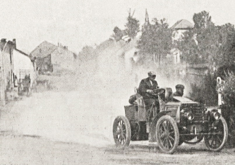 Une voiture de contrôle de l'A.C.F. au Paris-Berlin 1901 - Le Sport universel illustré du 6 juillet 1901, p.433